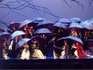 האופרה פיק דאם